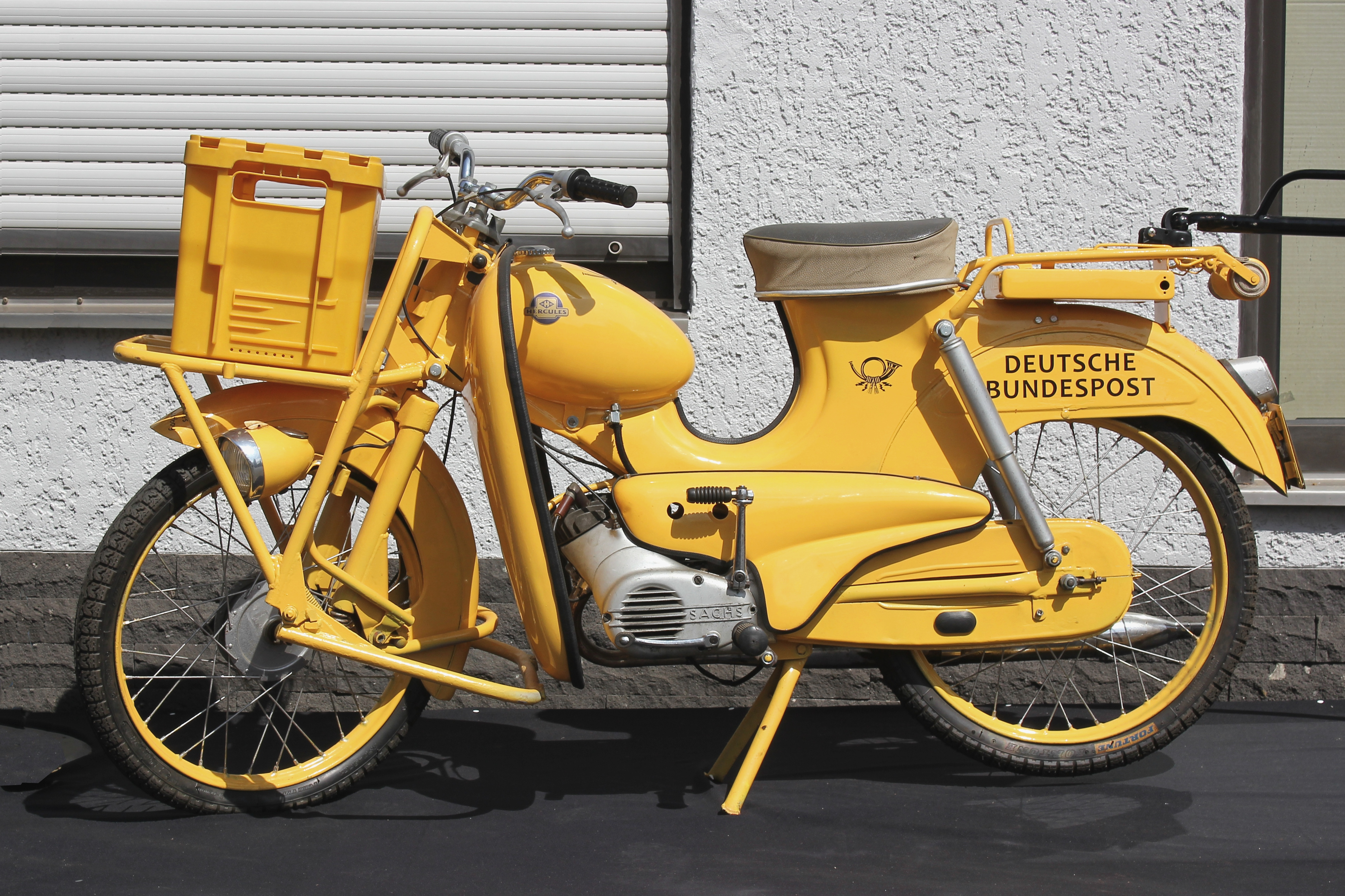 Hercules Lastboy (Bauzeit 1966–1984), Zweitaktmotor, 47 cm³, 2,6 PS, 3-Gang-Fußschaltung (auch mit 2-Gang-Handschaltung), vorn geschobene Kurzschwinge mit Schraubenfedern, Hinterradschwinge mit Teleskopfedern, Vollnaben-Trommelbremsen, Leergewicht 80 kg, zu. Gesamtgewicht 180 kg; ca. 1200 Stück wurden gebaut